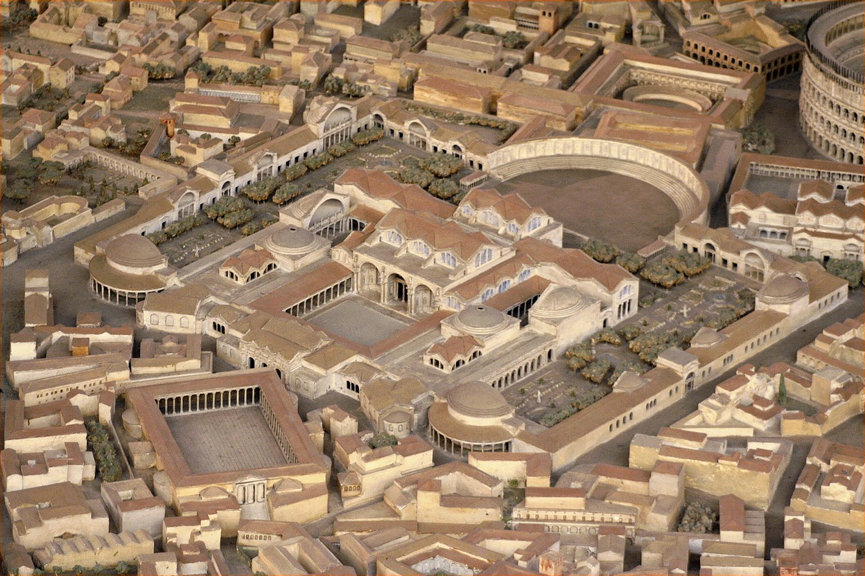 Thermes de Trajan sur la maquette de I. Gismondi exposée au Museo della Civilta Romana, EUR, Rome.